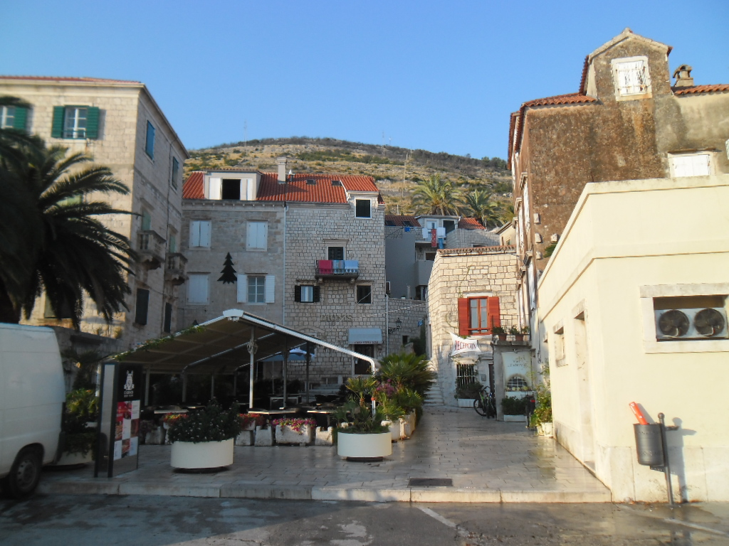 grad Vis